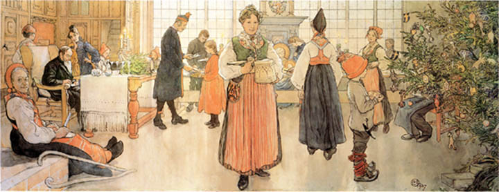 Now is it Christmas Againlabel QS:Lsv,"Nu är det jul igen" label QS:Len,"Now is it Christmas Again"